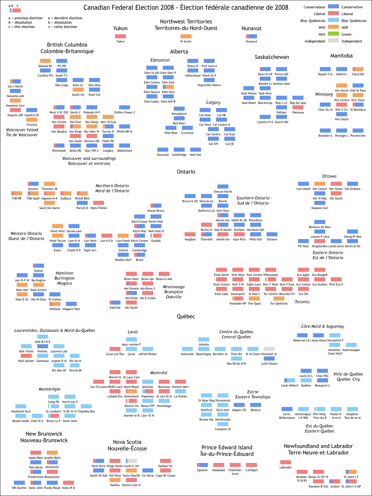 Canadian Federal Election 2008